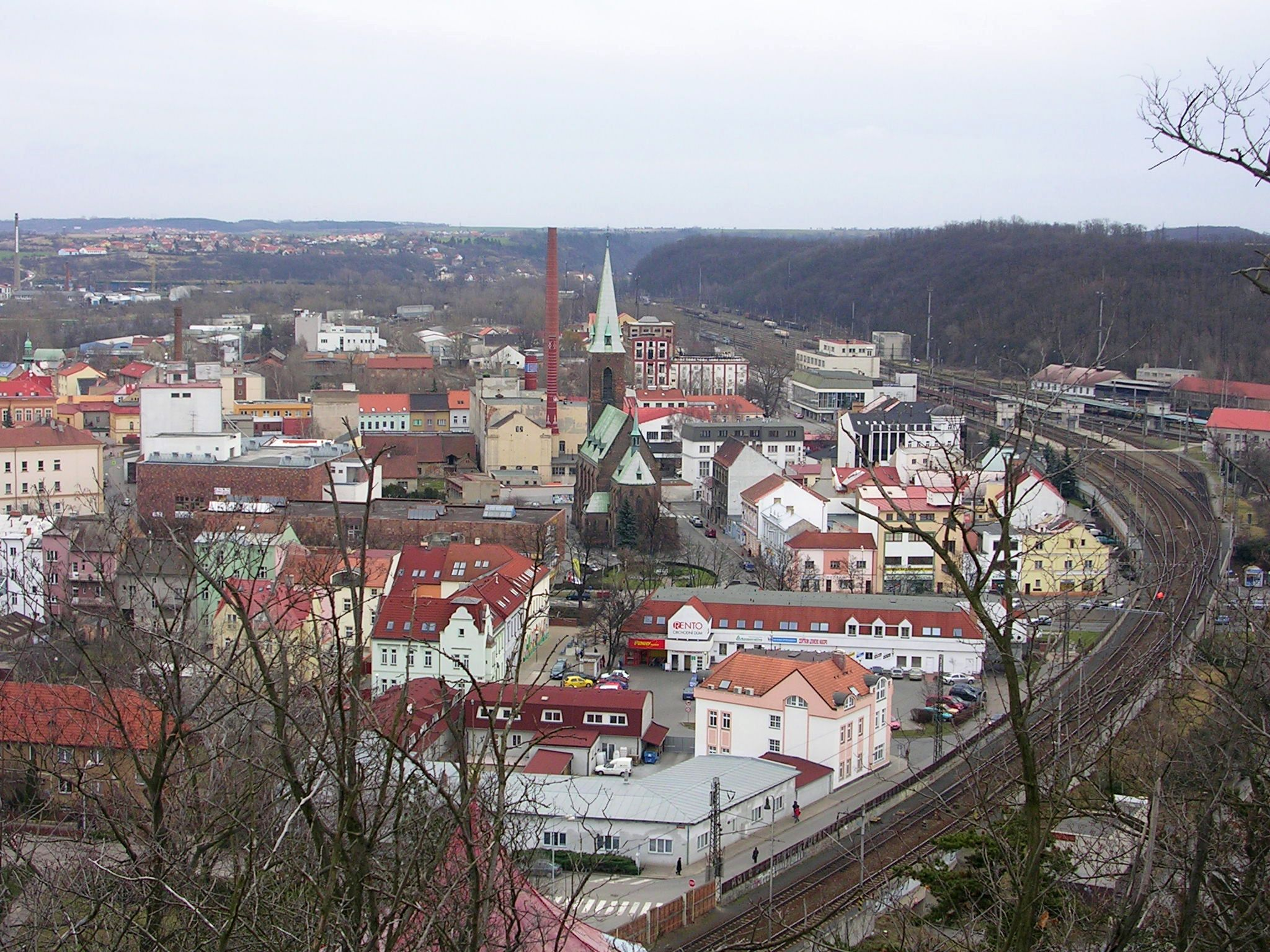 Kralupy nad Vltavou, pohled z vyhlídky u Lobče (od bunkru poblíž Jarníkových schodů)